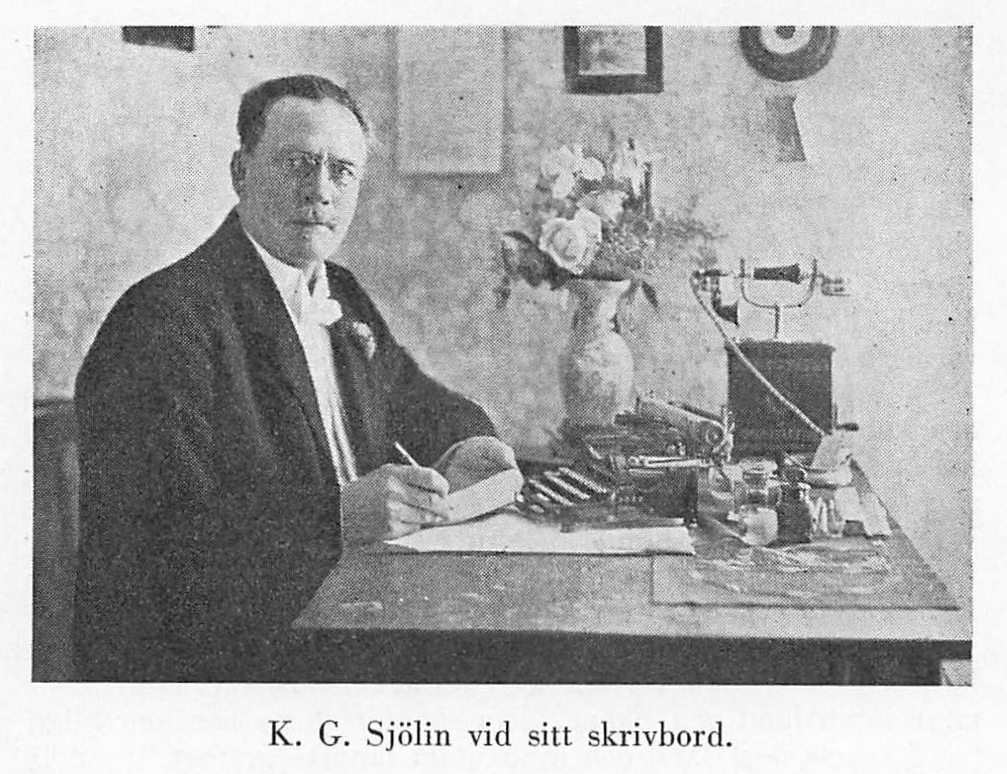 Karl Gustaf Sjölin